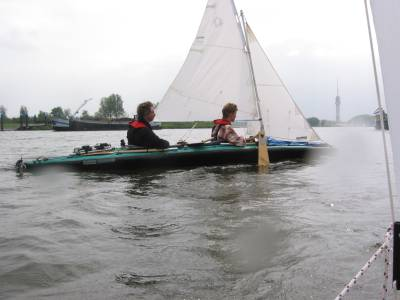 Klepper vouwkano onder zeil, foto gemaakt vanuit een andere Klepper, 11 mei 2002 op de Maasplassen bij Roermond. Categorie:Afbeelding schip